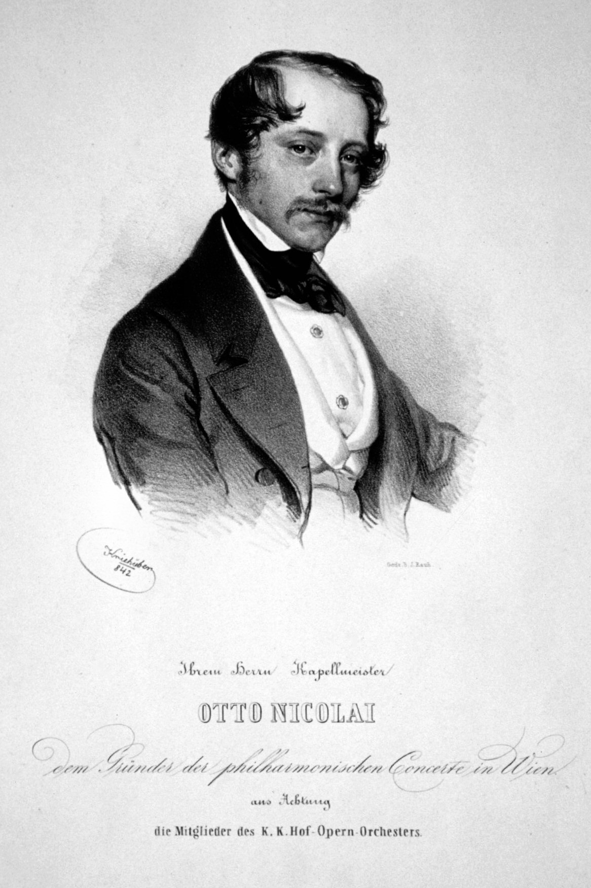 Otto Nicolai. Lithographie